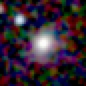 Galaxy NGC 35